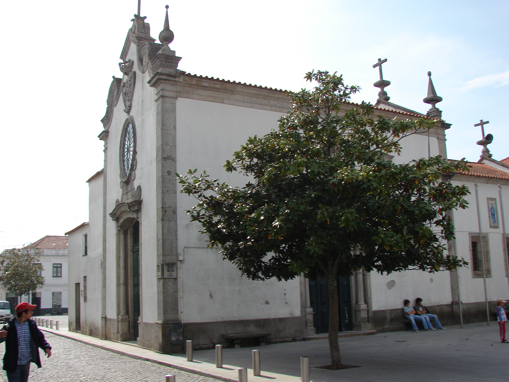 Igreja da Misericórdia de esposende, património construido, de caráter religioso